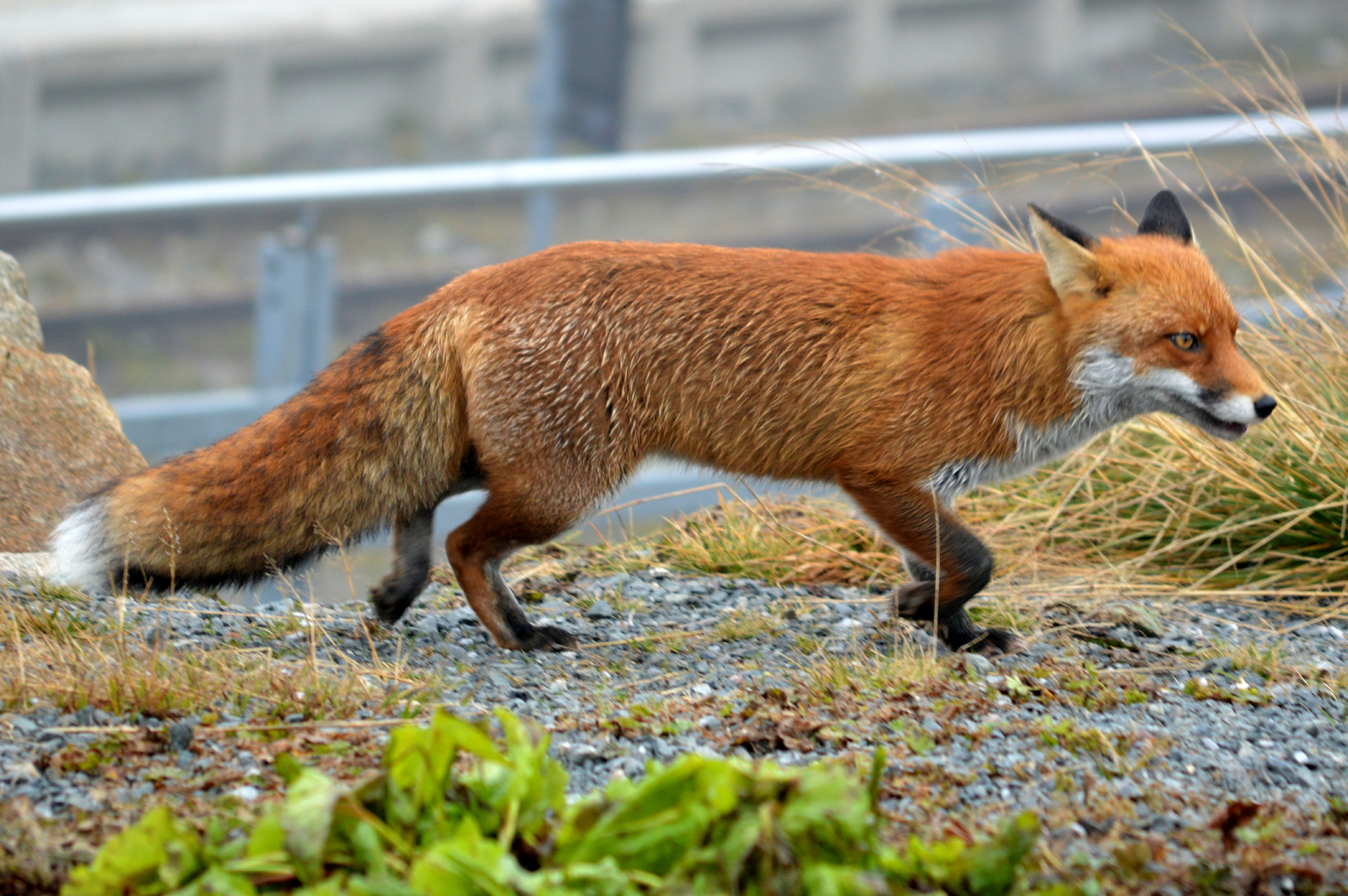 Nationalpark Harz - Der Brockenfuchs (1)